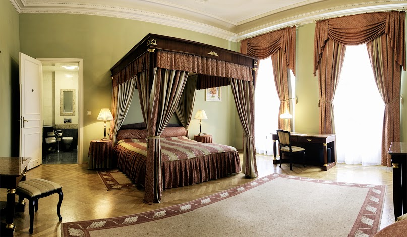 Apartament Grand Hotel Kraków